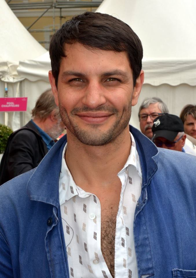 Marc Ruchmann au festival de Cabourg